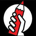 Logo of "Wij vertrouwen stemcomputers niet"